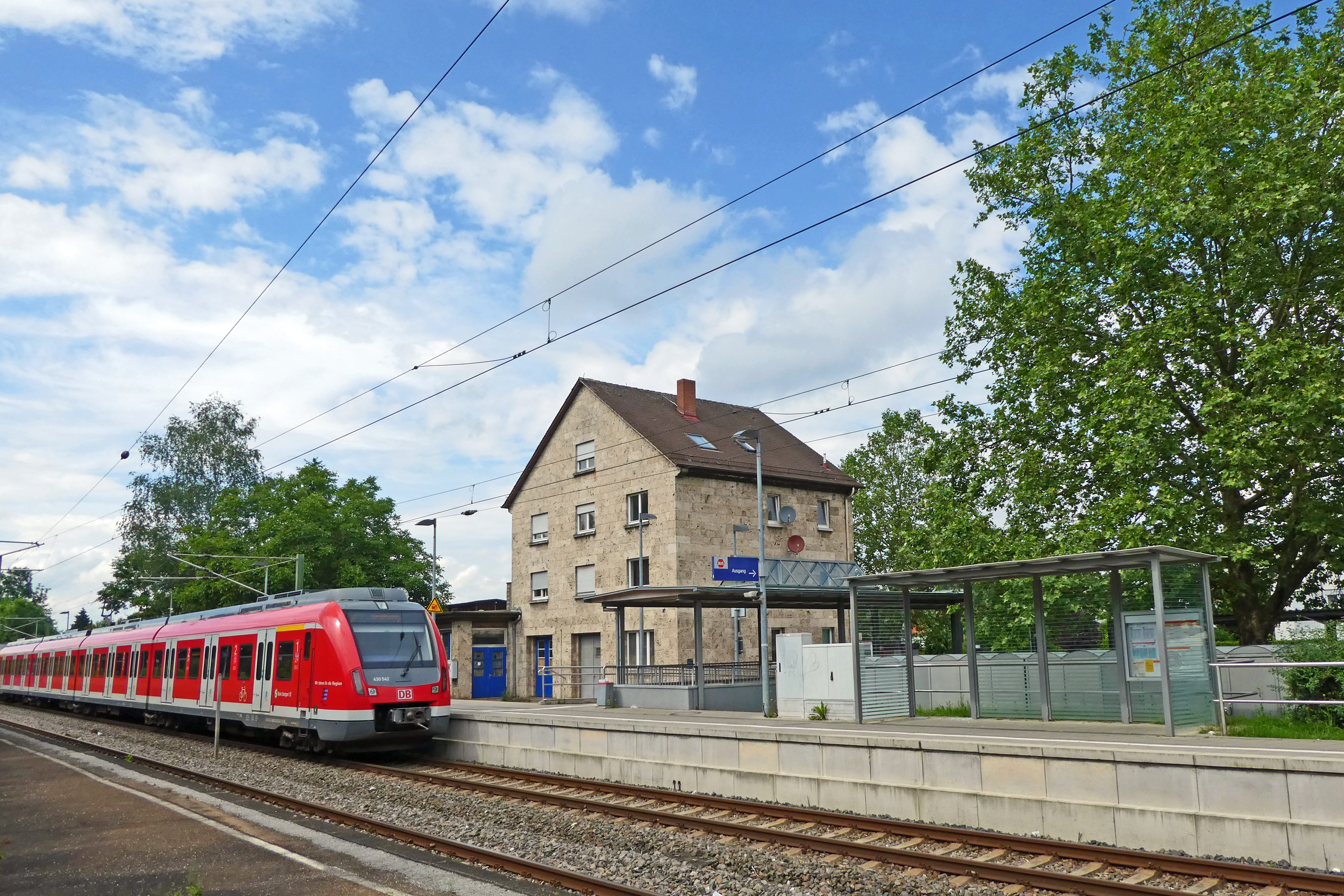 S-Bahn am Ötlinger Bahnhof